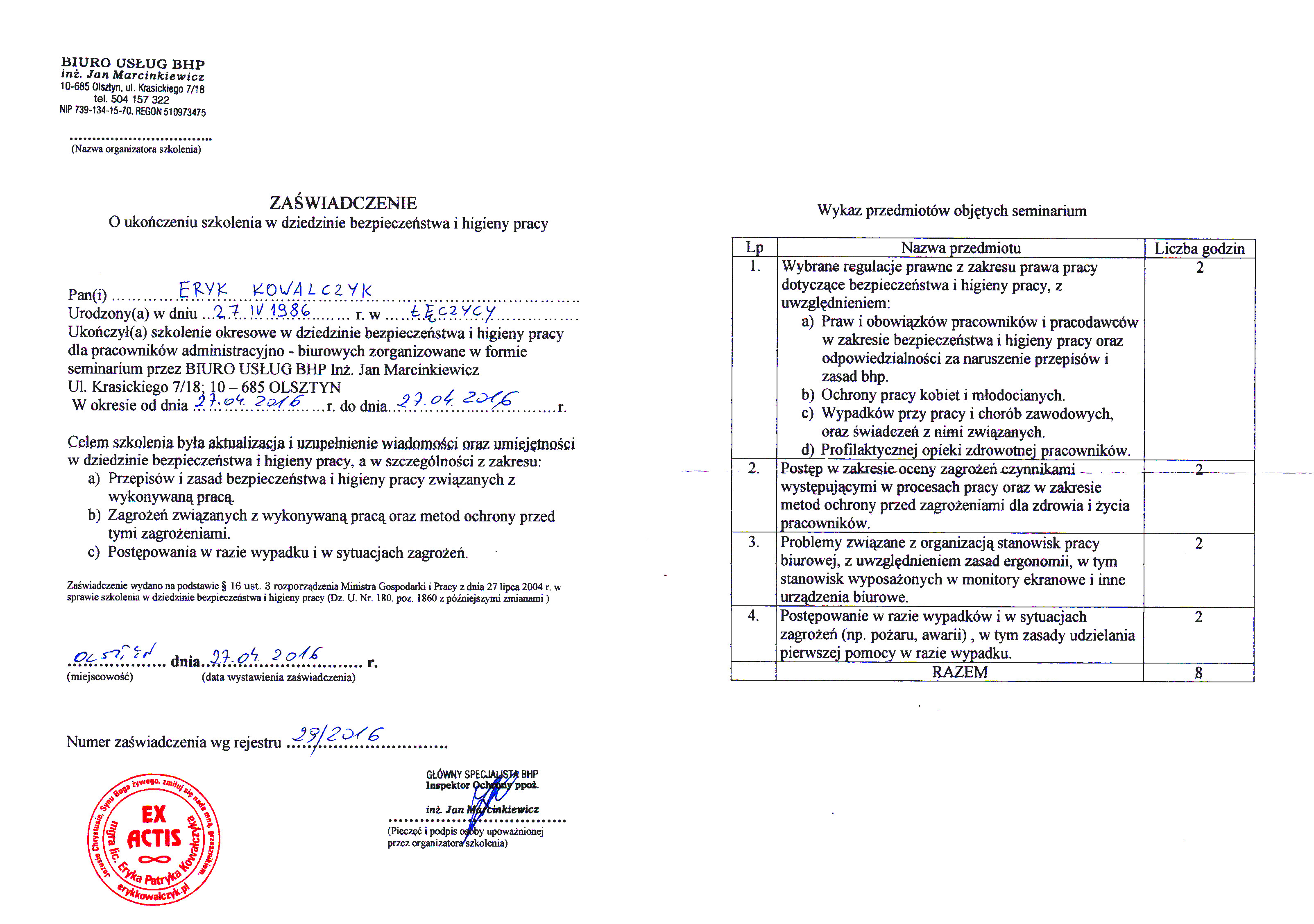 zaświadczenie